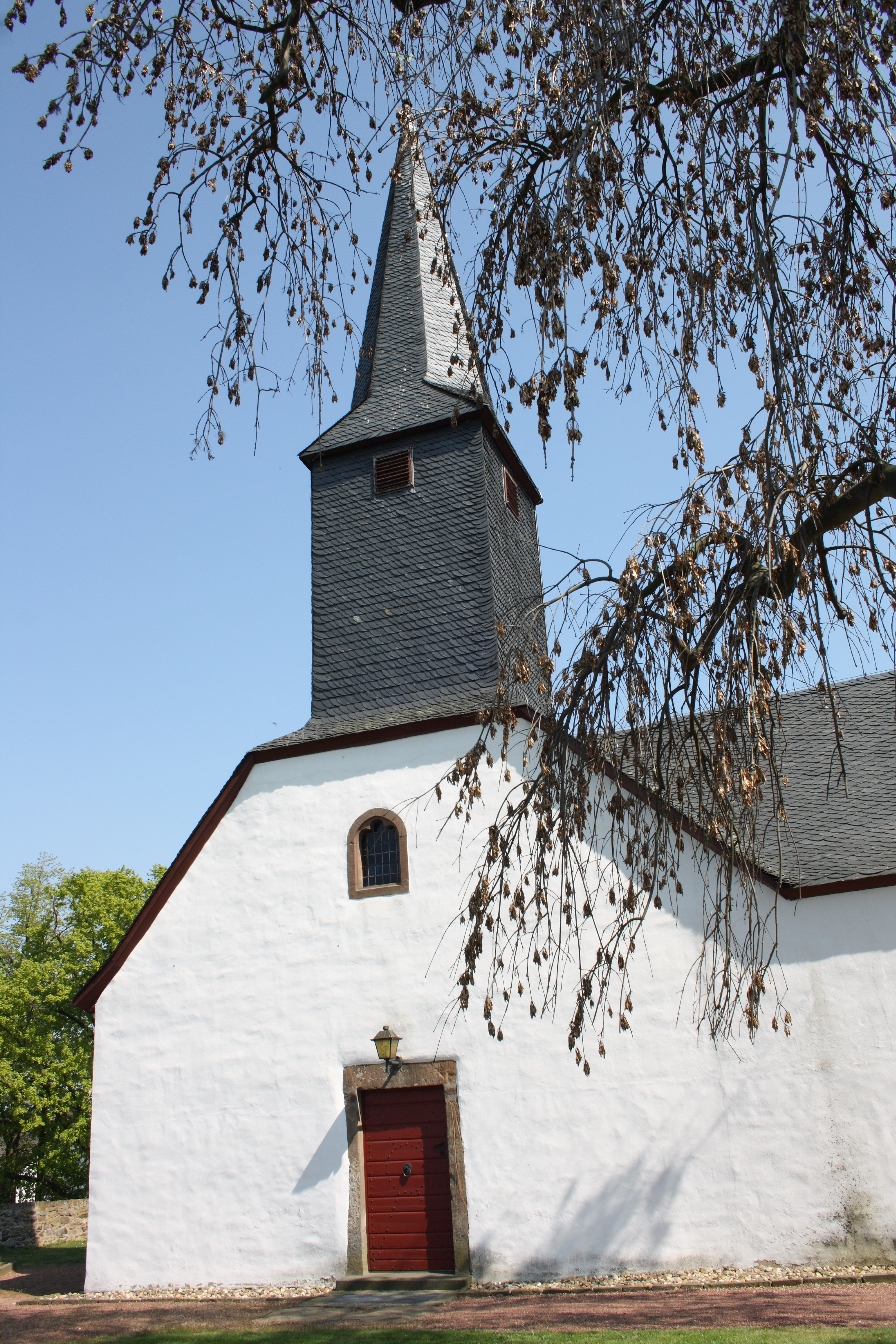 katholische Pfarrkirche St. Laurentius in Niederkastenholz von Westen